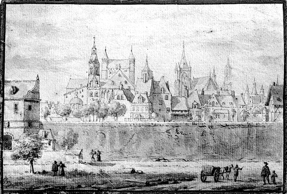 Zicht op Het Bat en Onze Lieve Vrouwewal met kerken, naar Abraham Rademaker? (1676/77-1735) (bijschrift: Rijksarchief Maastricht)